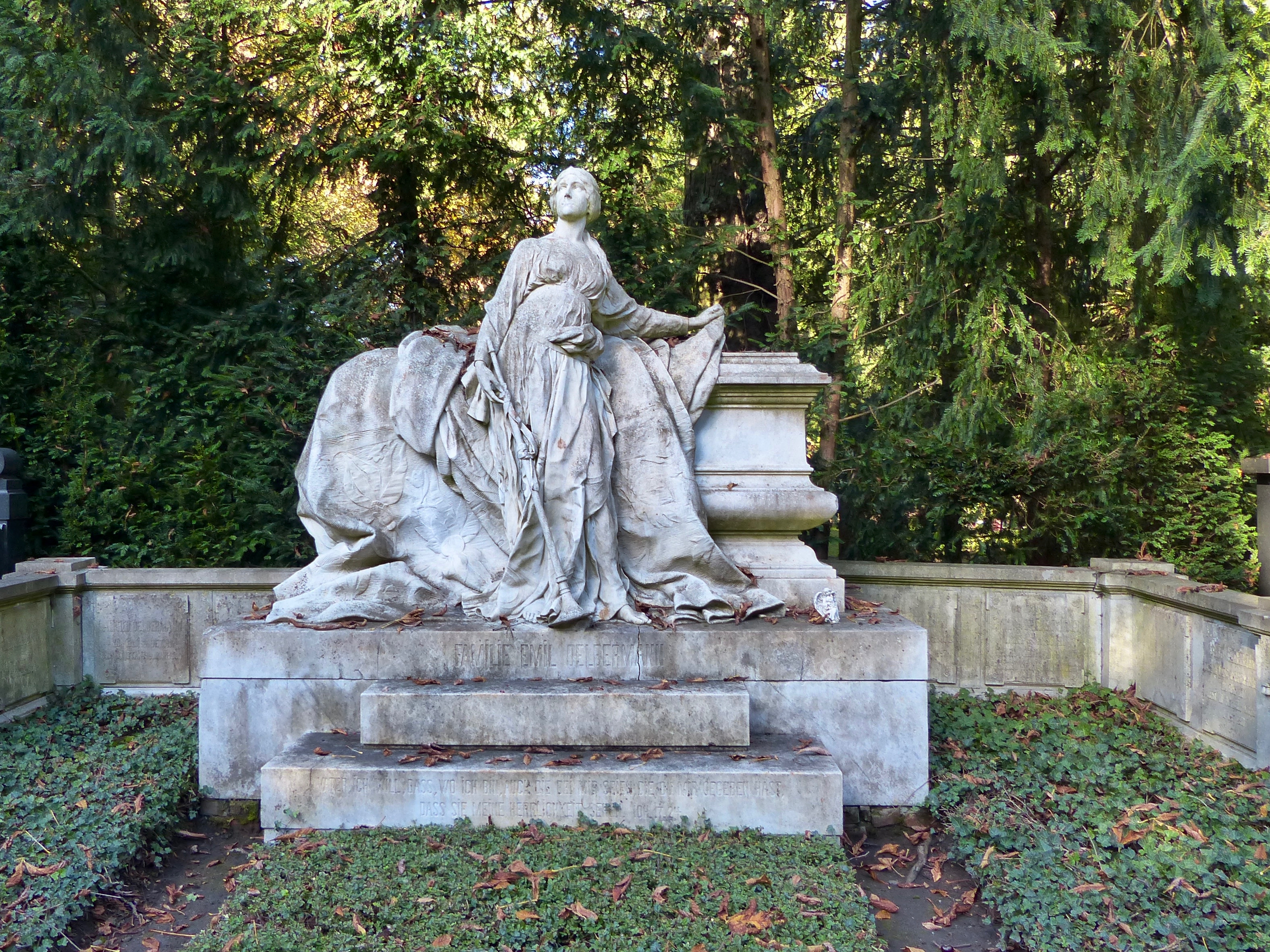 Grabmal Emil und Laura Oelbermann, Friedhof Melaten , (MA, Flur 70) ; Entwurf Karl Janssen; im Zweiten Weltkrieg zum Teil zerstört